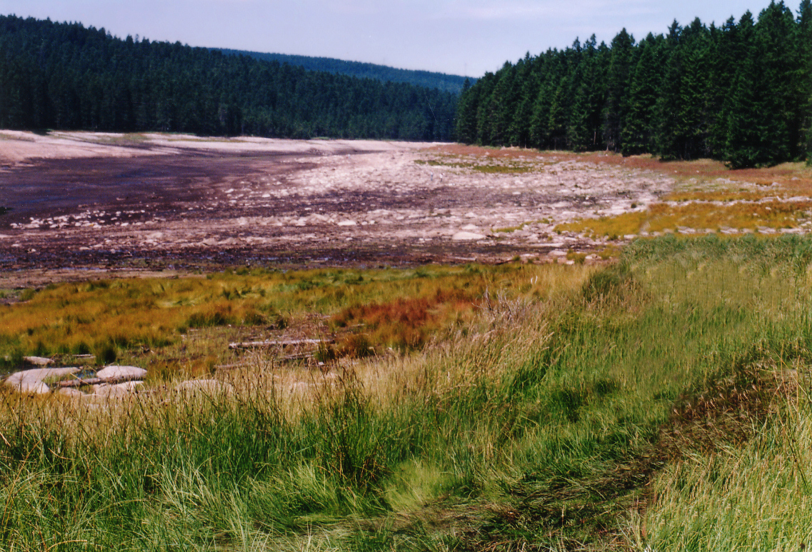 Ausgetrockneter Oderteich